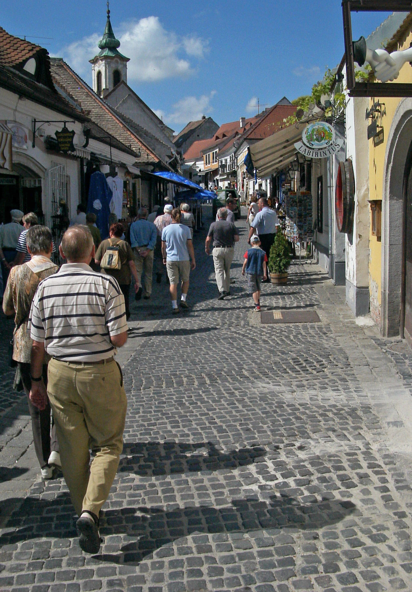 Szentendre - staré město, Maďarsko